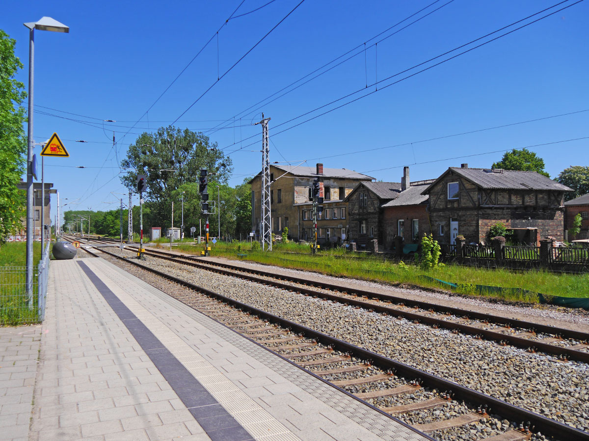 Bahnsteig und Schienen Bahnhof Lalendorf